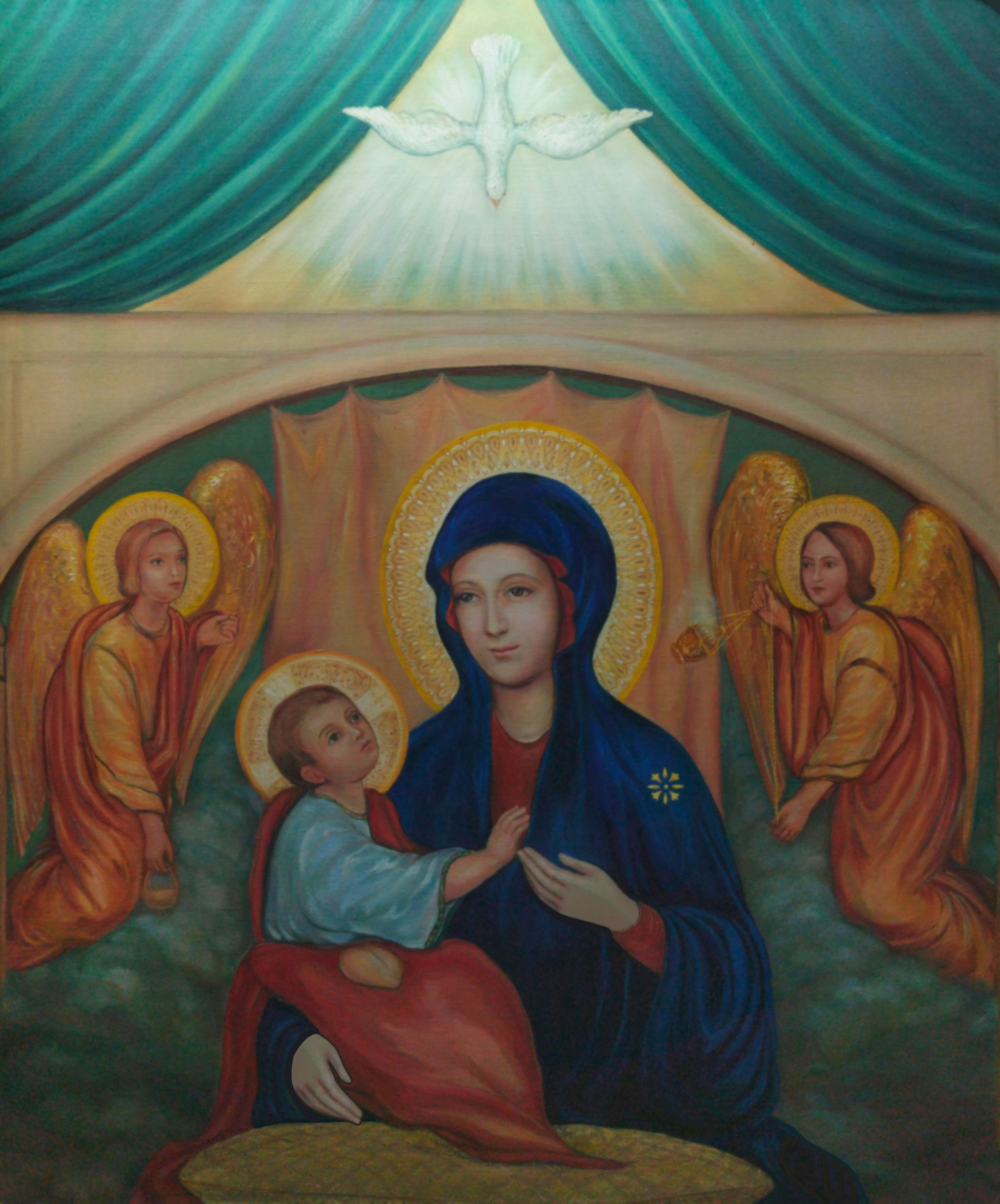 Imagen de Nuestra Señora del Divino Amor